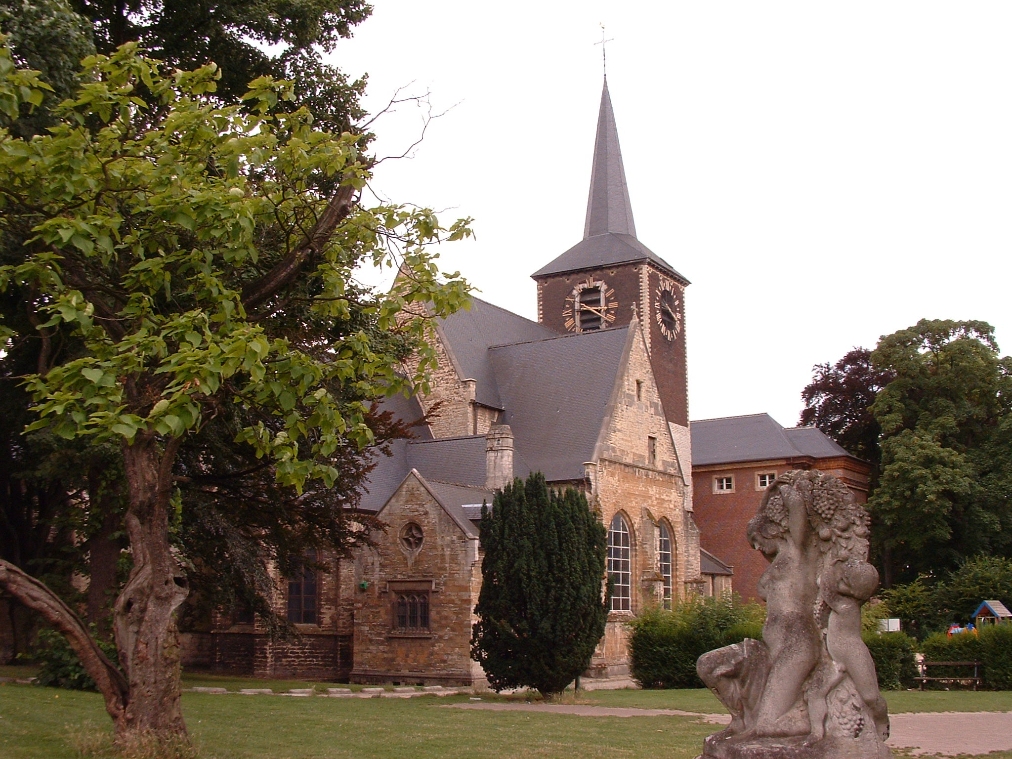 Foto: G. Debognies (21/07/05)